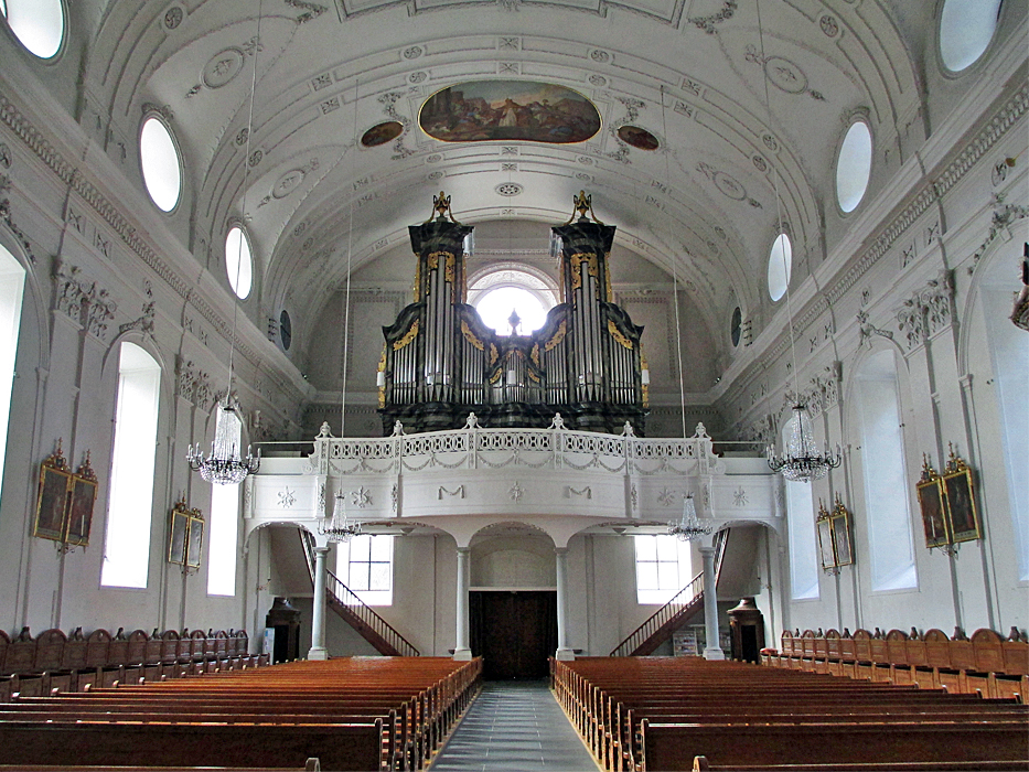 Inneres der Pfarrkirche St. Martin in Altdorf